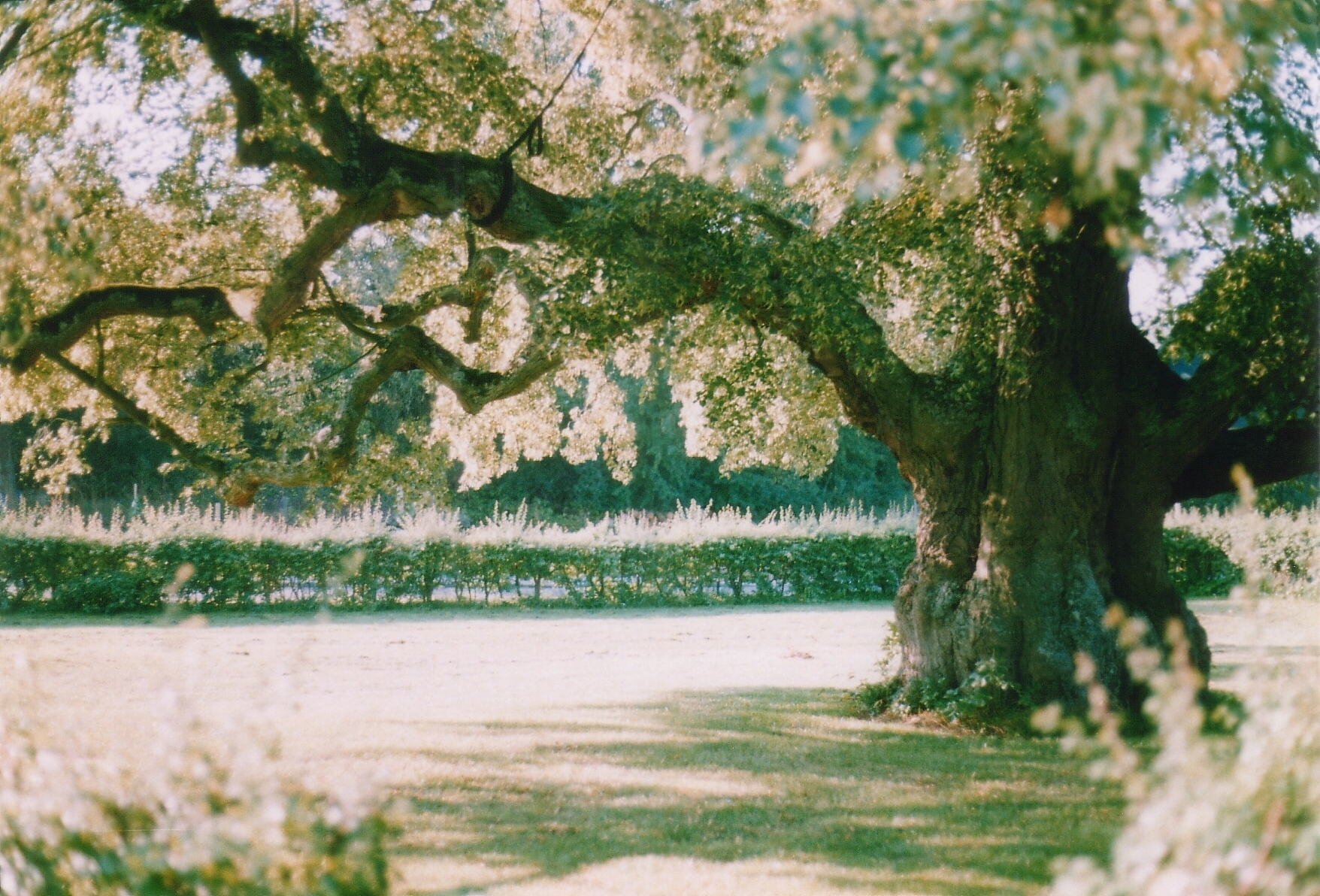 Linde in Schönaich, eine als Naturdenkmal geschützte Winterlinde (Tilia cordata) im Landkreis Böblingen, Baden-Württemberg